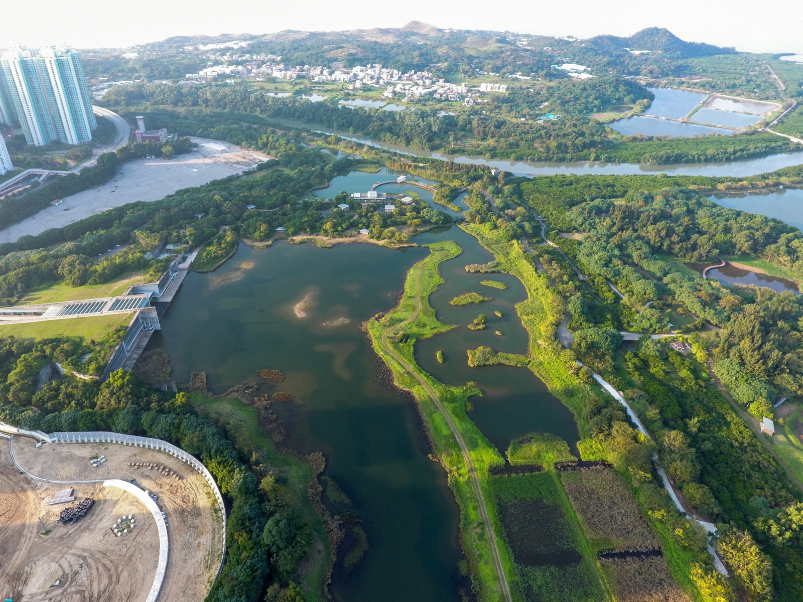 Hong Kong Wetland Park